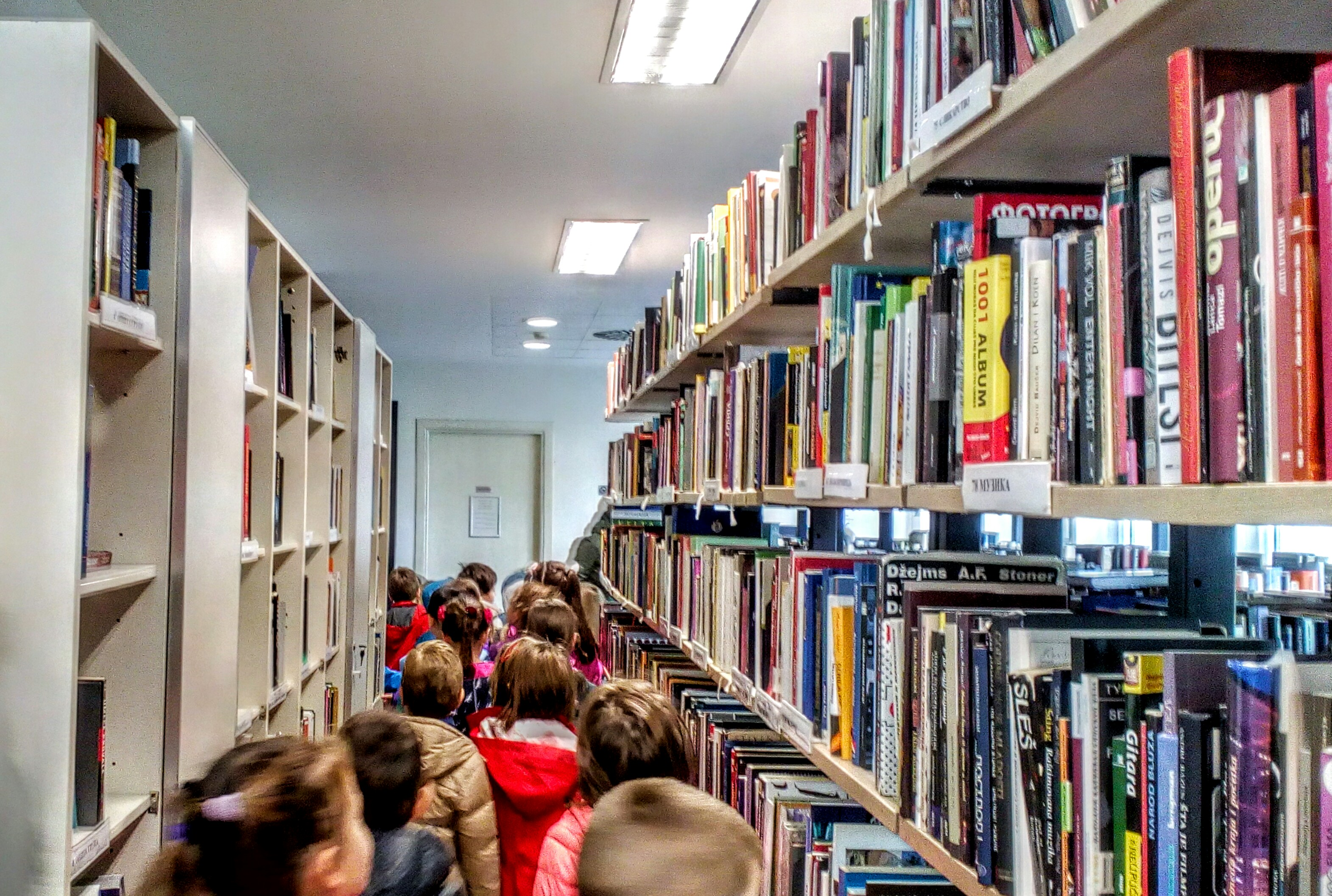 Poseta najmlađih članova biblioteci